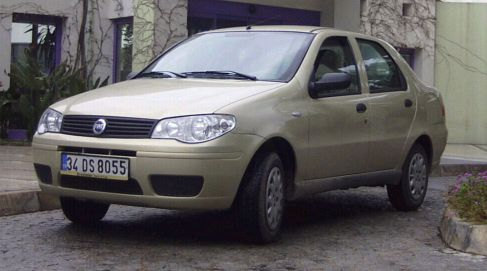 Fiat Albea Mk2 in Bodrum, Turkey